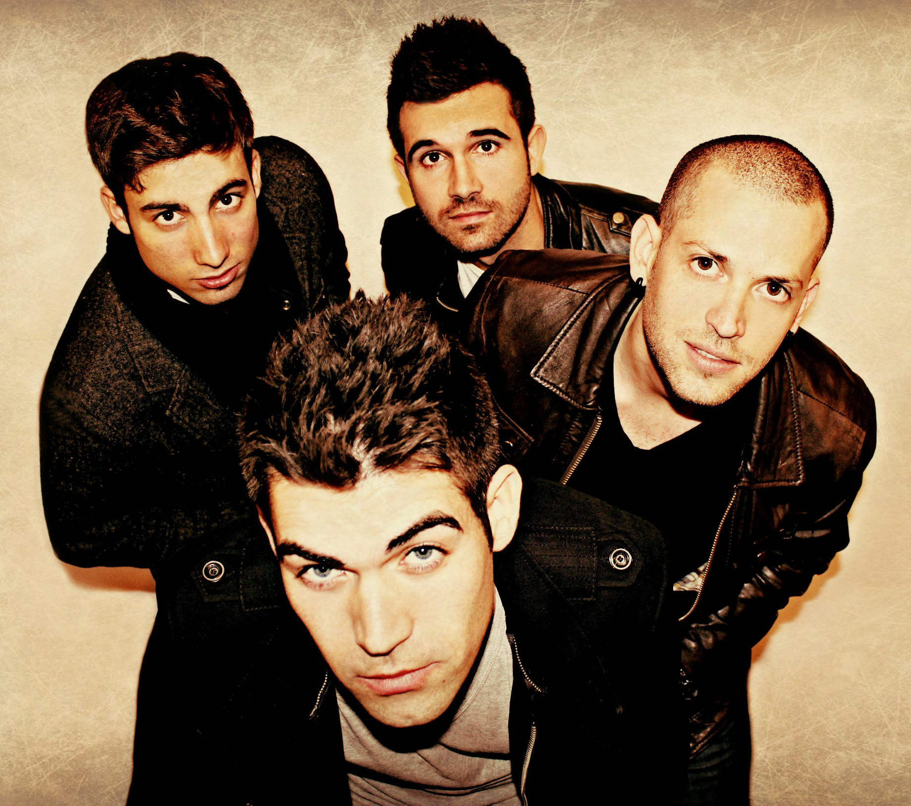 Héroes (banda)